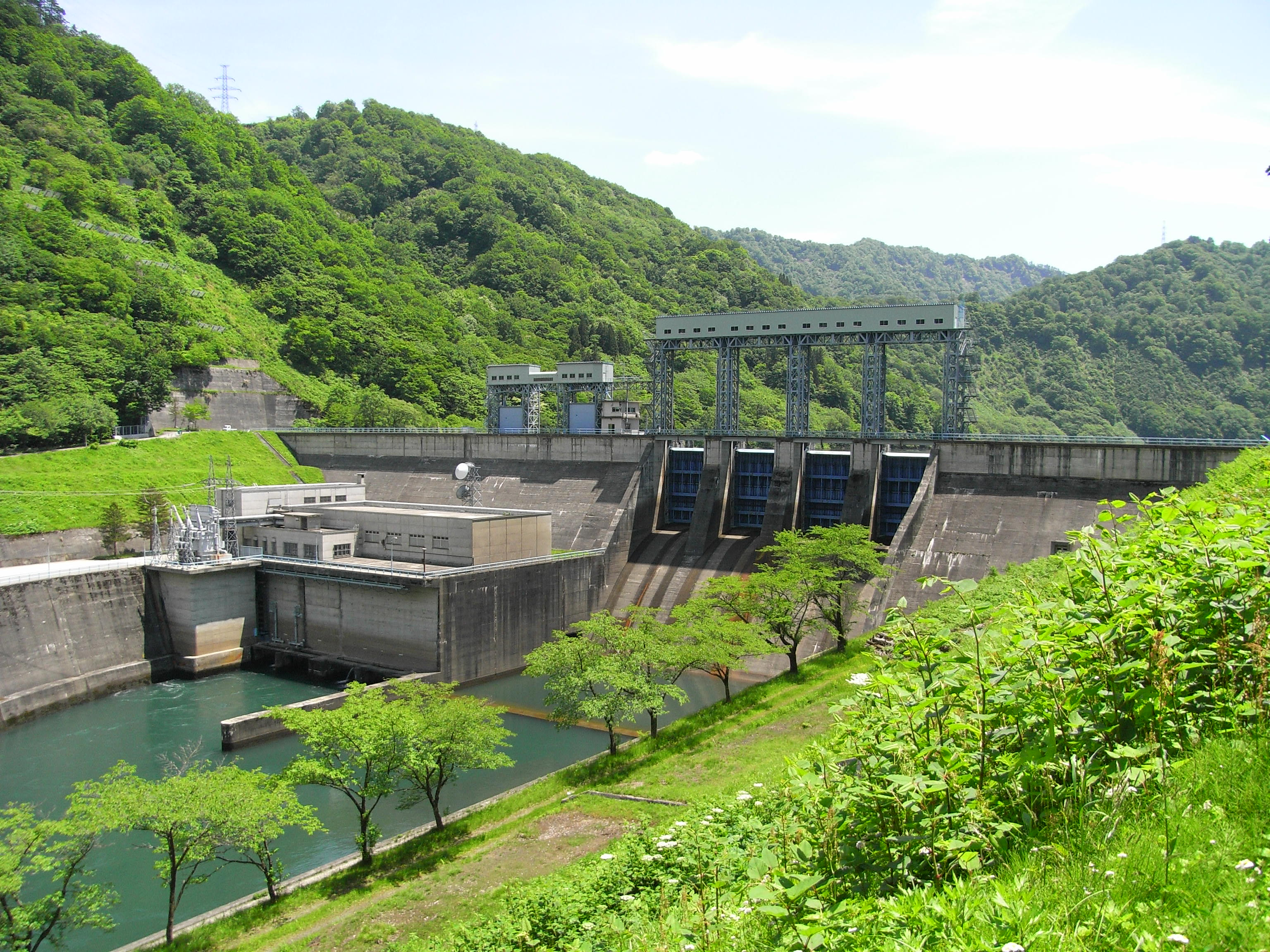 Dam